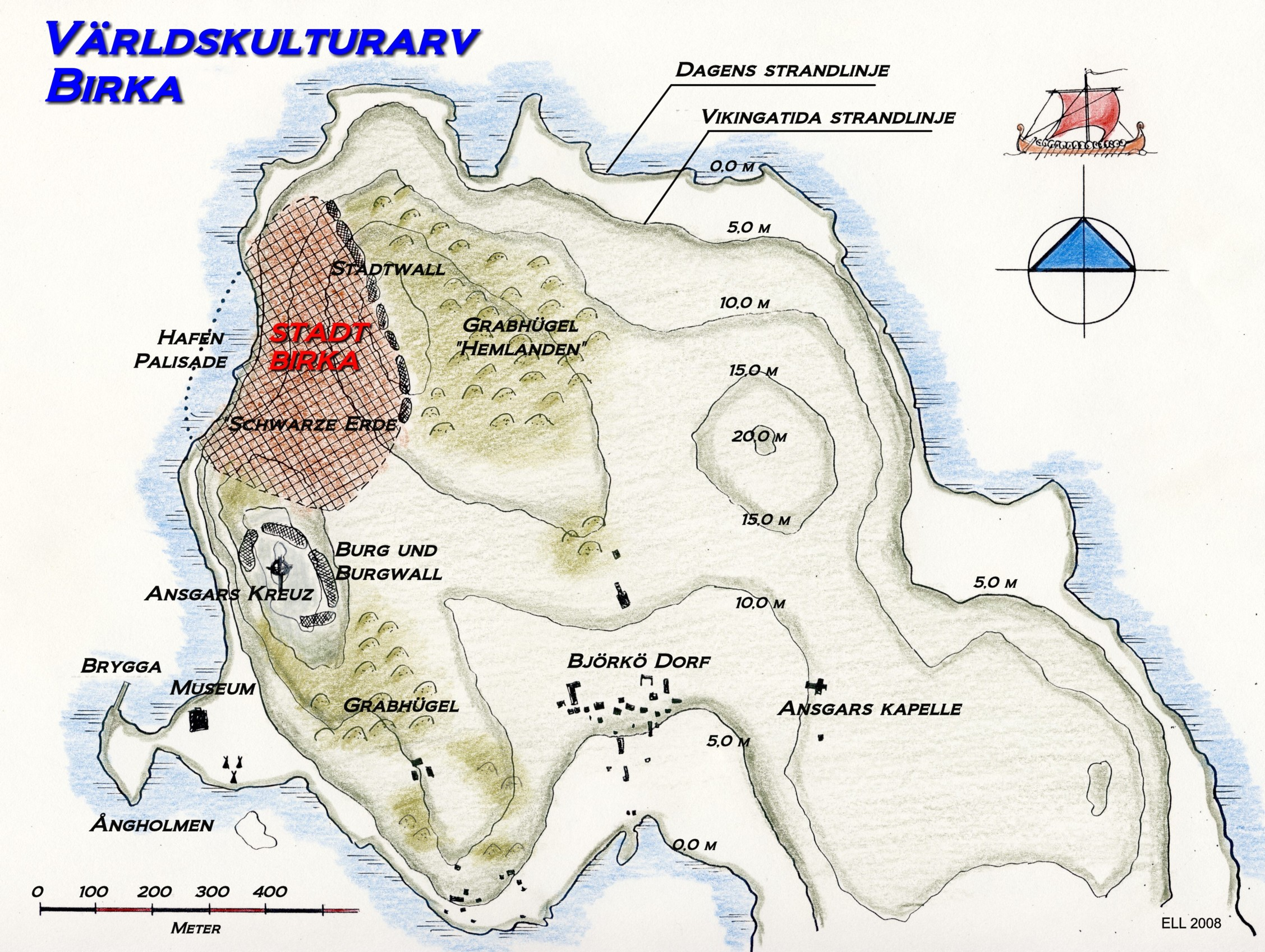 Karta över världskulturarvet Birka, svensk version